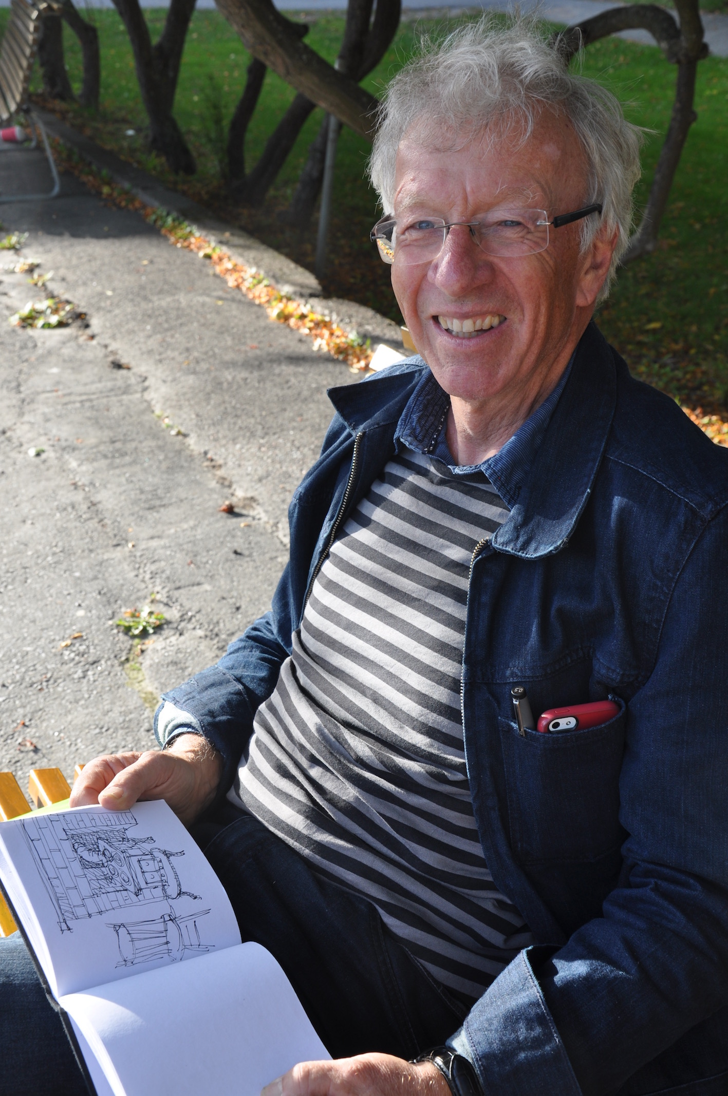 Björn Ed med två signifikativa attribut: anteckningsblocket och den randiga tröjan.